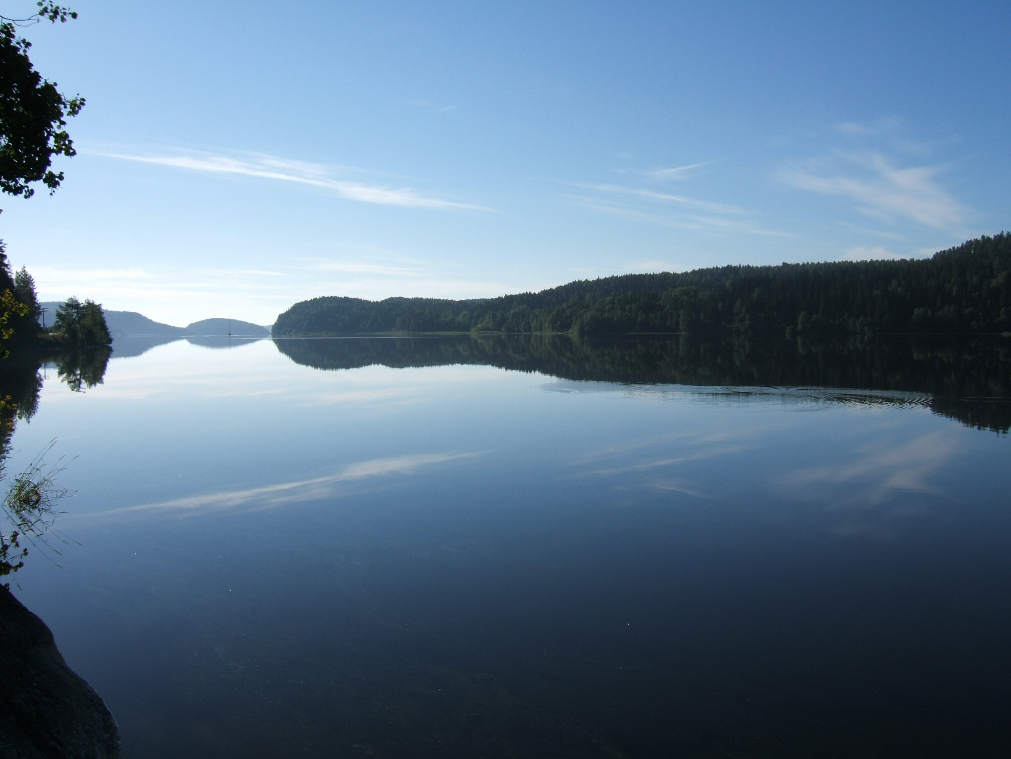 Sortavalan saaristoa Karjalassa.